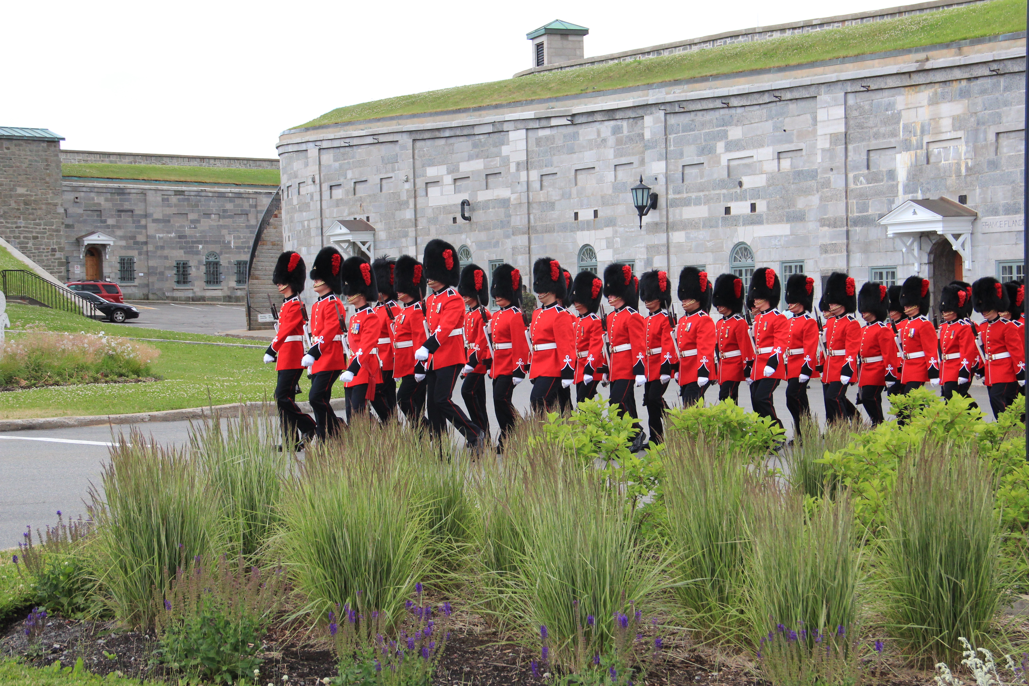 Royal 22e Régiment